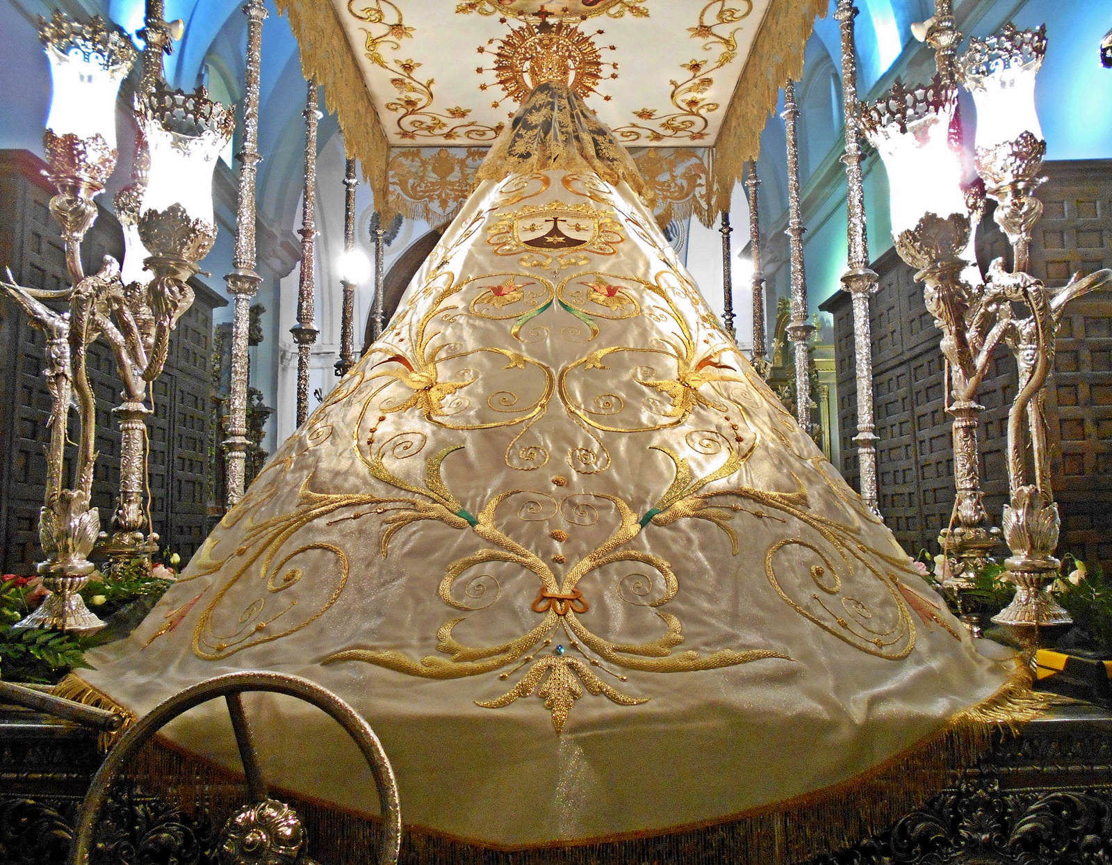 Nuevo Manto de la Virgen del Carmen de Pozuelo de Calatrava. Estrenado el 16 de julio de 2018. Financiado, sin ayuda pública, por los miembros de la Junta Directiva de la Cofradía, hermanos cofrades y pozueleños en general, a título de donativos particulares.